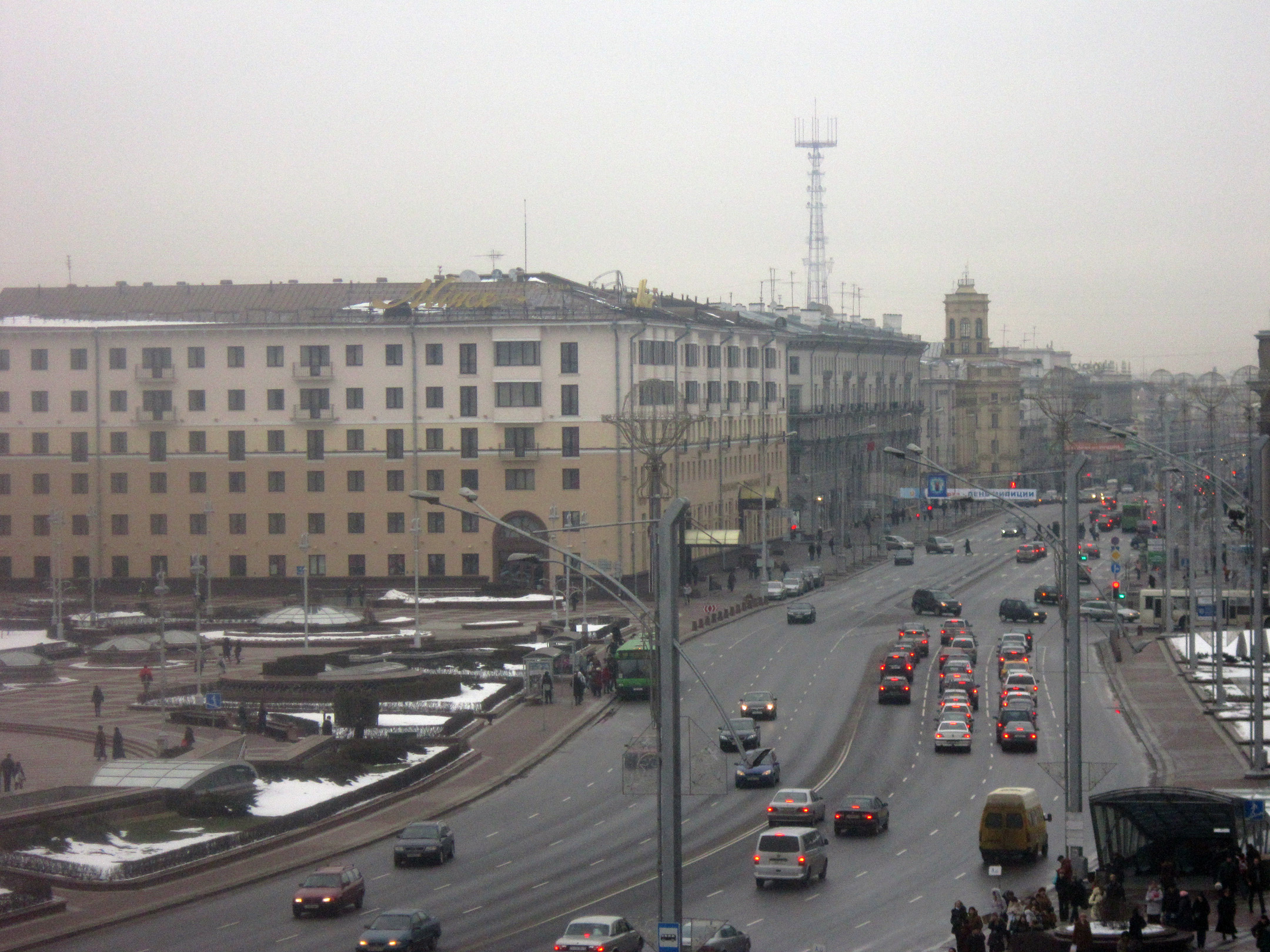 Минск. Площадь Независимости и начало проспекта Независимости